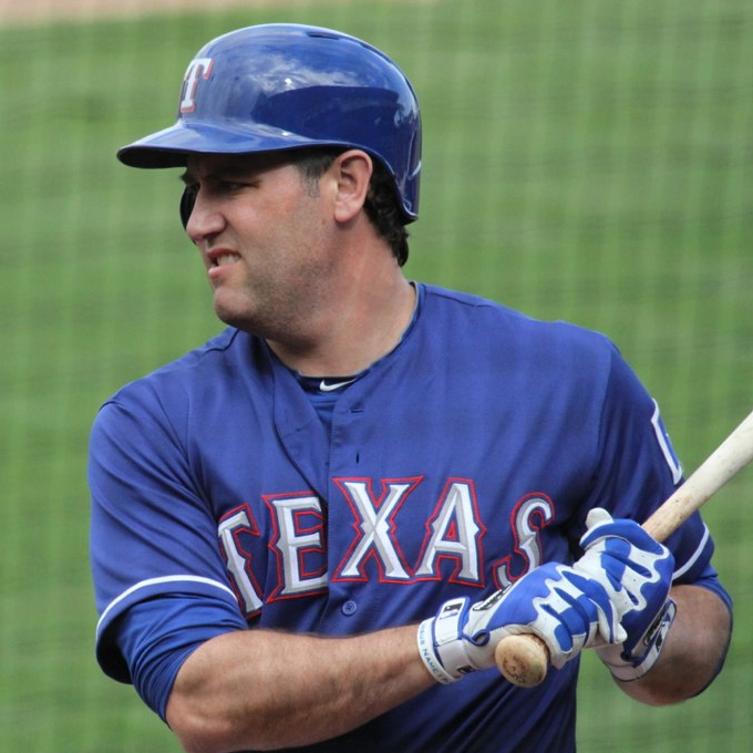 Lance Berkman